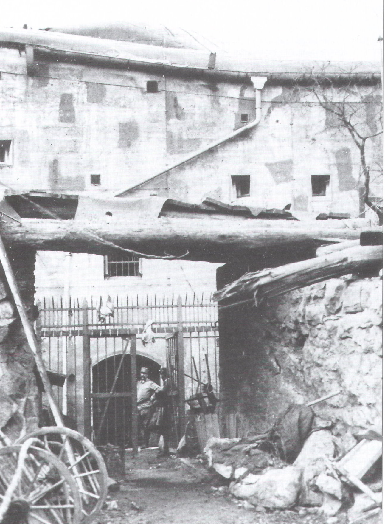 Fort Garda (Festung Riva) / Werk Garda der Festung Riva